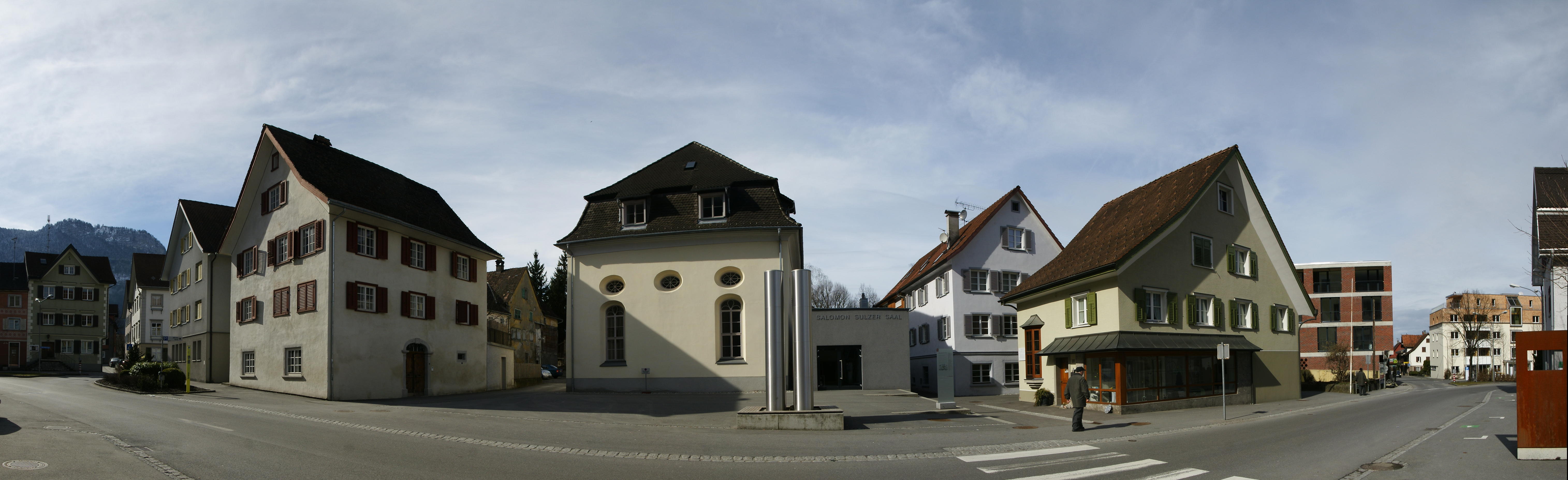 ein Teil des Jüdischen Viertels in der Schweizer-Str. in Hohenems. In der Mitte der Salomon-Sulzer-Saal 1770 bis 1772 (frühere Synagoge) des Baumeisters: Peter Bein